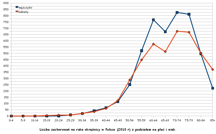 Rak okrężnicy - wykres zachorowalnośći